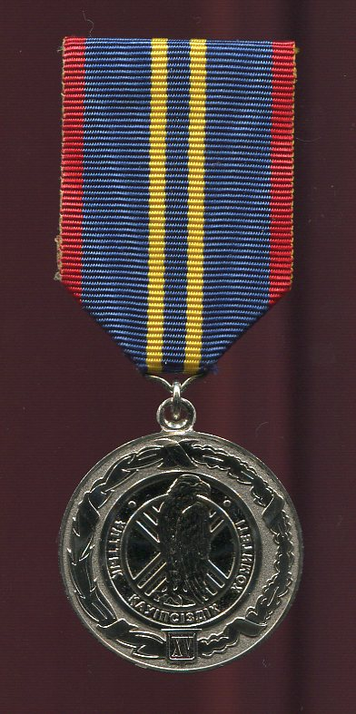 Медаль «За безупречную службу в комитете национальной безопасности» 2 степени